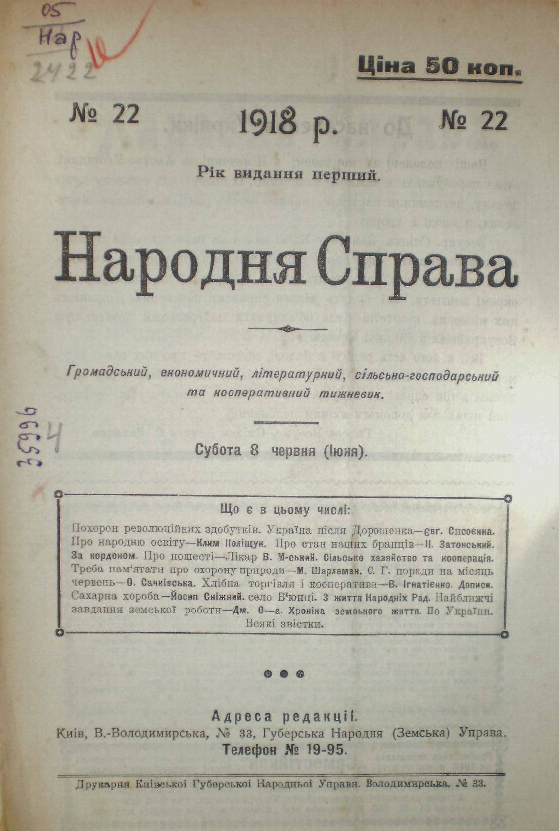 Громадський, економічний, літературний, сільсько-господарський та кооперативний тижневик. Видавався 1918 року Губернською народною (земською) Управою у Києві.